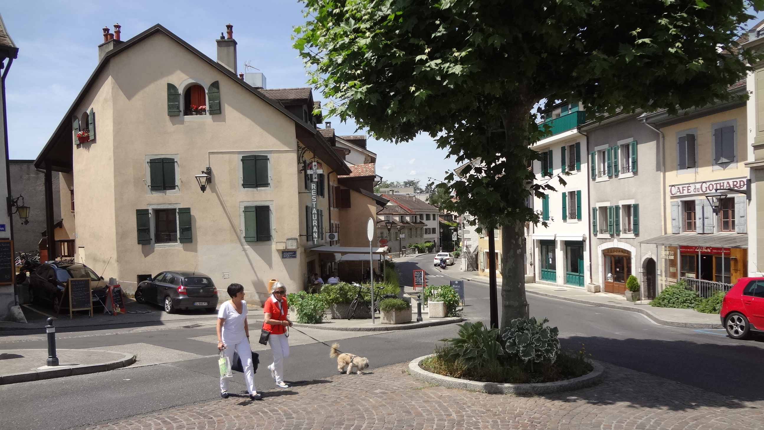 Maisons du quartier du Vieux-Chêne le long de l'ancienne route entre Chêne-Bougeries et Chêne-Bourg dans le canton de Genève. Les maisons des deux communes sont de part et d'autre du Pont du Vieux-Chêne, sur la Seymaz. Ici du côté de Chêne-Bourg.